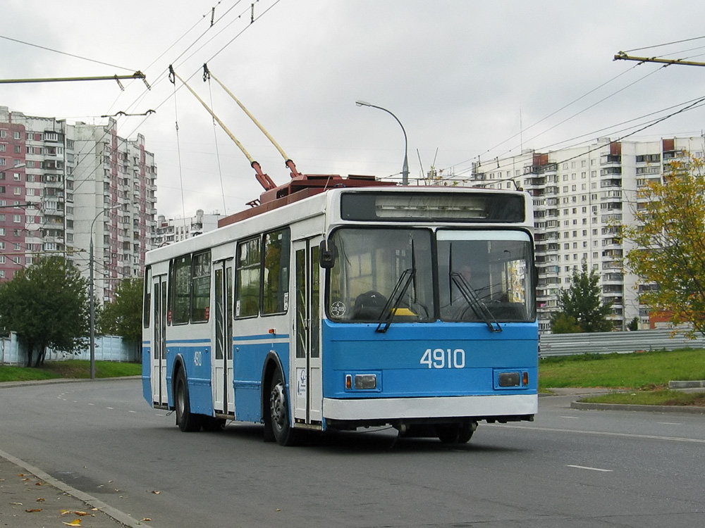 Перегонка ВМЗ-5298 № 4910 из 4-го троллейбусного парка в Новокосинский троллейбусный парк